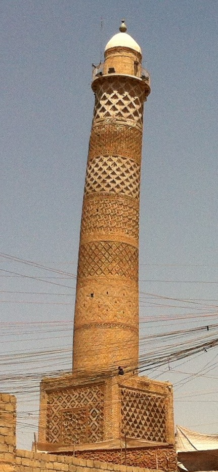 Al-Nuri Mosque (Mosul)